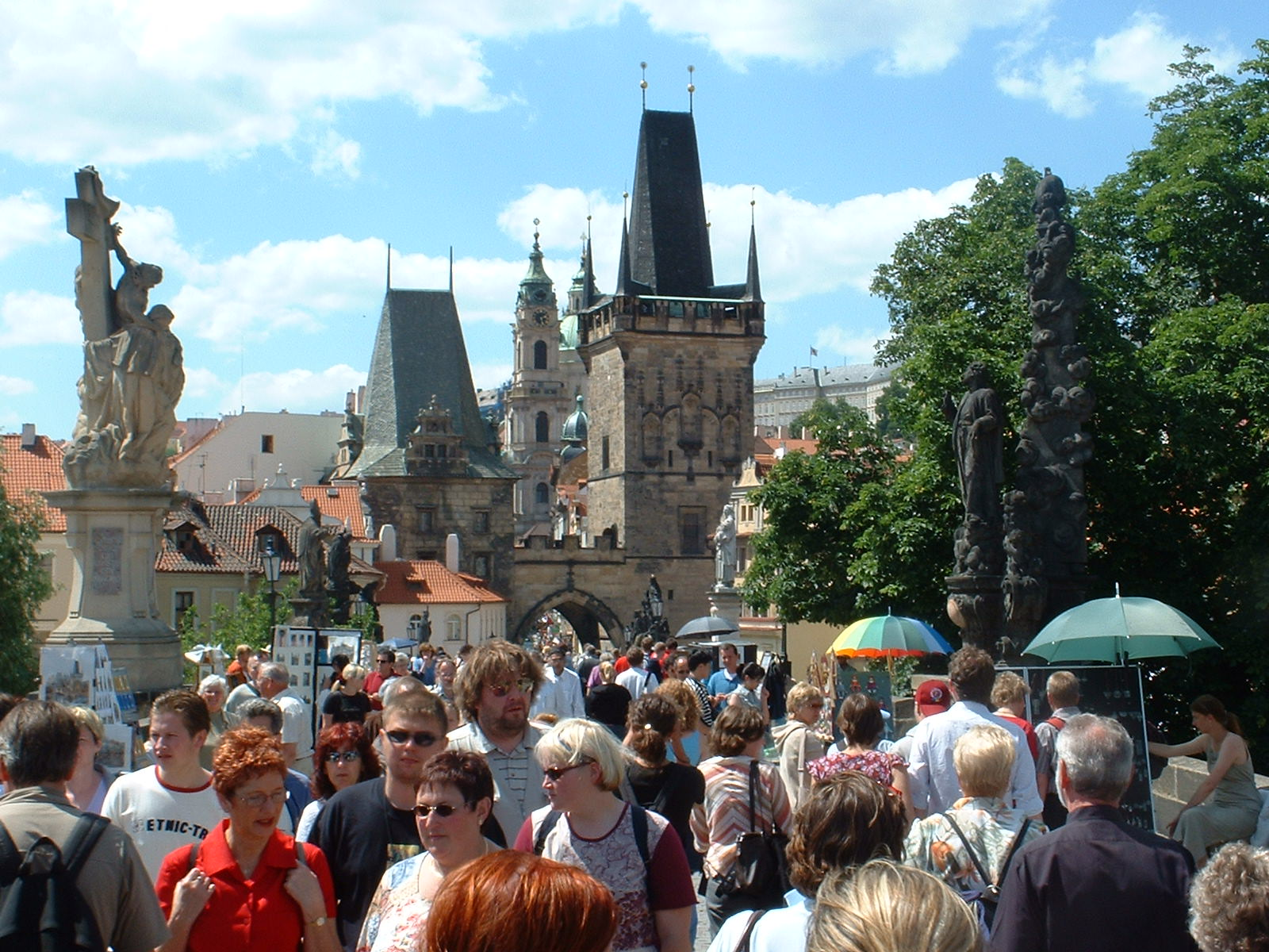 Touristenmassen auf der Karlsbrücke